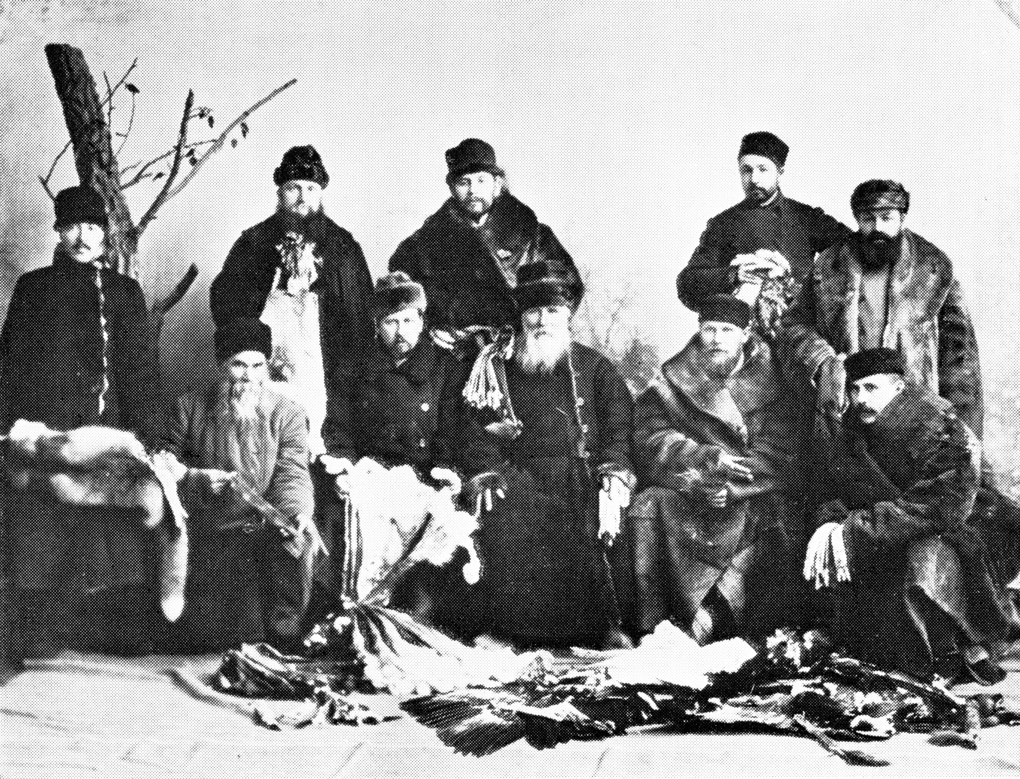 Fellhändler in Kurgan (Sibir) im Jahr 1900. Bildunterschrift: Hugo Fränkel (Mitte stehend) auf dem Markt in Kurgan (Sibir) im Jahre 1900.